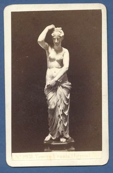 Giorgio Sommer (1834-1914), L'Afrodite Urania, a Firenze, fotografata verso il 1860. Numero di catalogo: 2978.